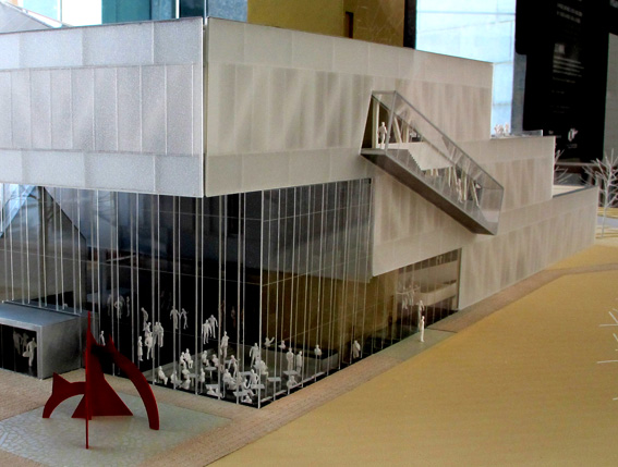 Maquette du nouveau pavillon Pierre-Lassonde du Musée national des beaux-arts du Québec, Québec, Canada